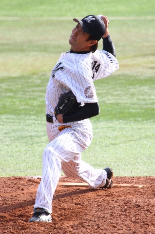 日本プロ野球 千葉ロッテマリーンズ 藪田安彦 投手